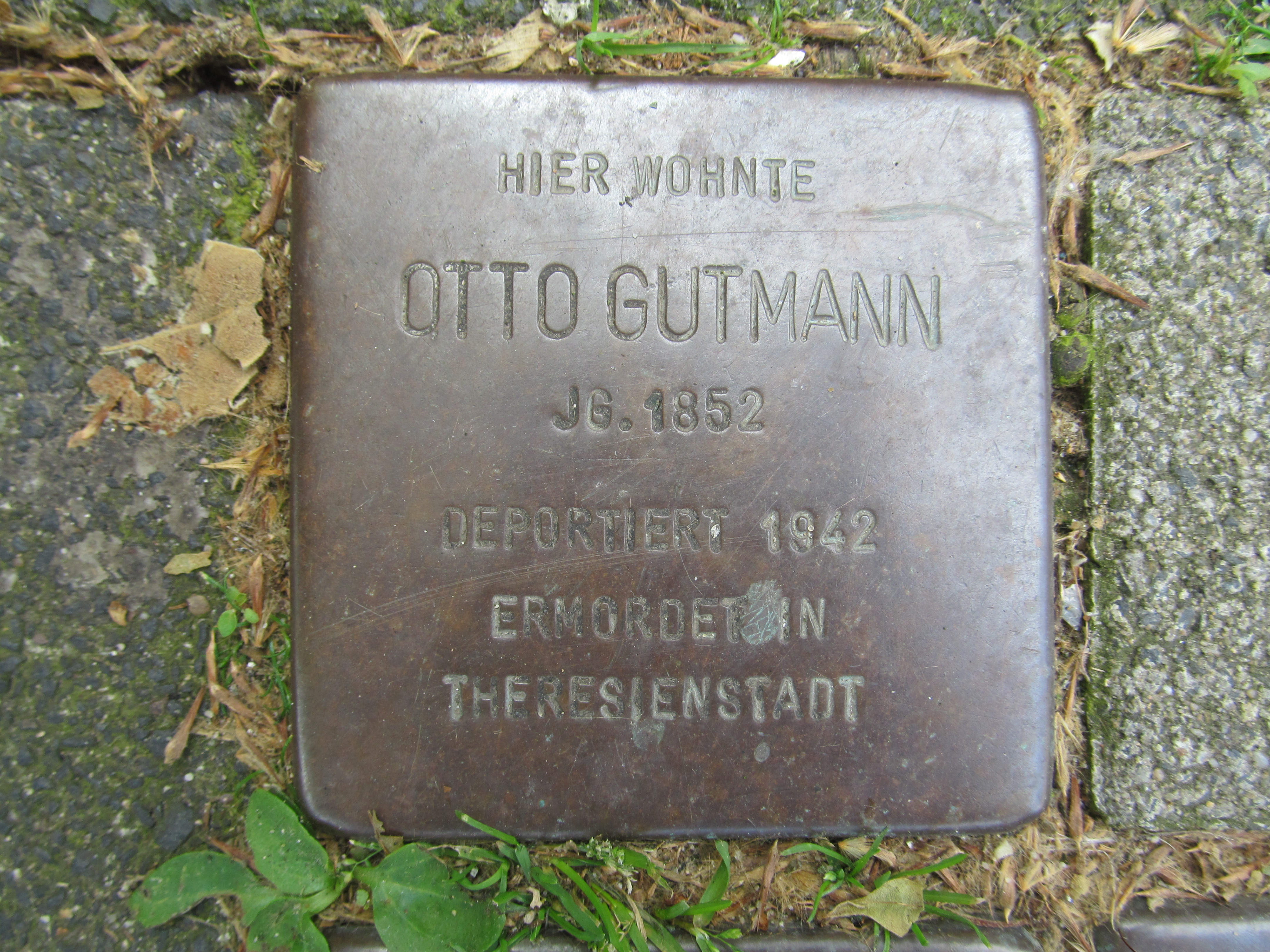 der Stolperstein für Otto Gutmann vor dem Haus Rheinstraße 27 in Duisburg-Homberg